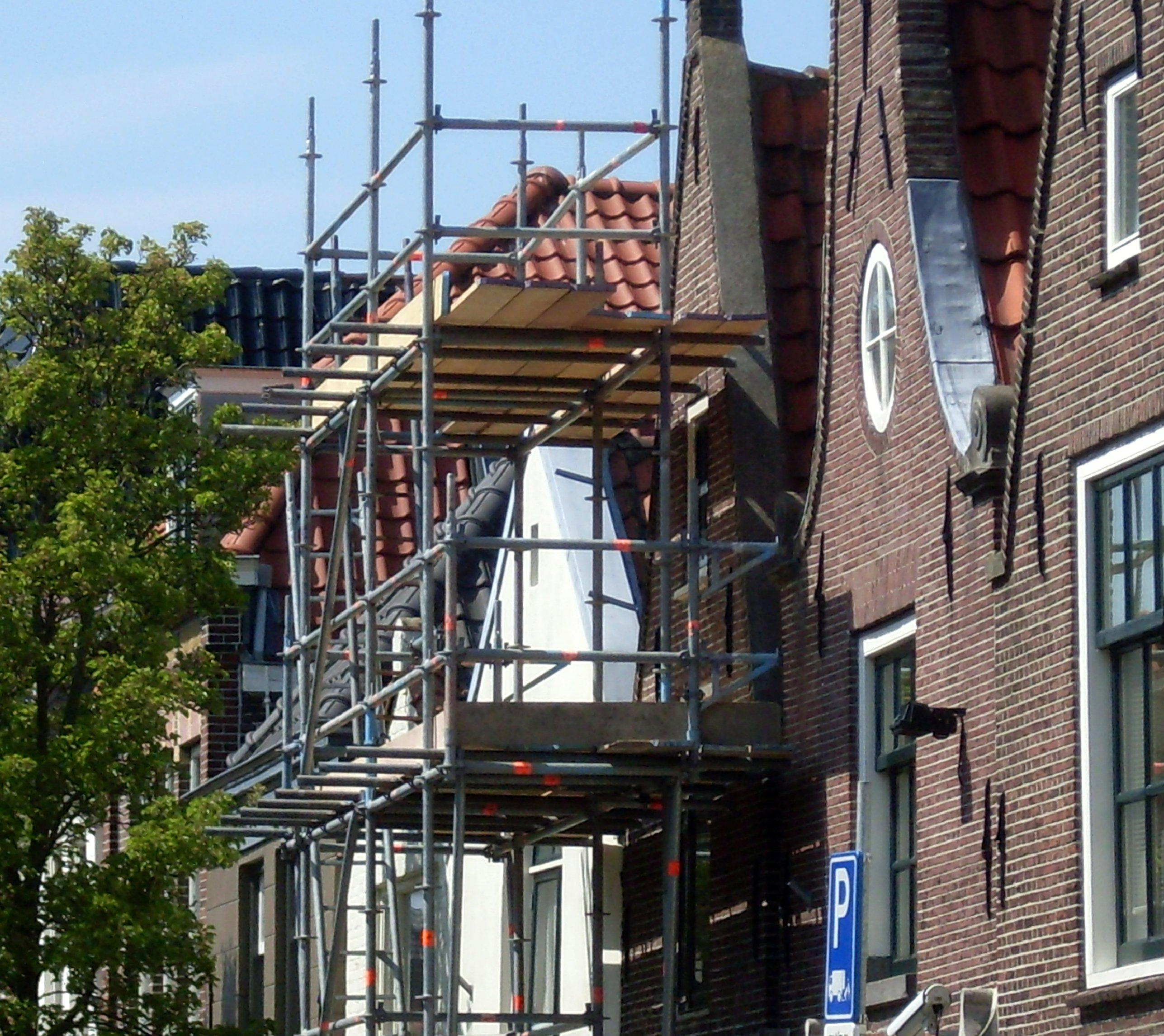 Restauratiewerkzaamheden in Alkmaar